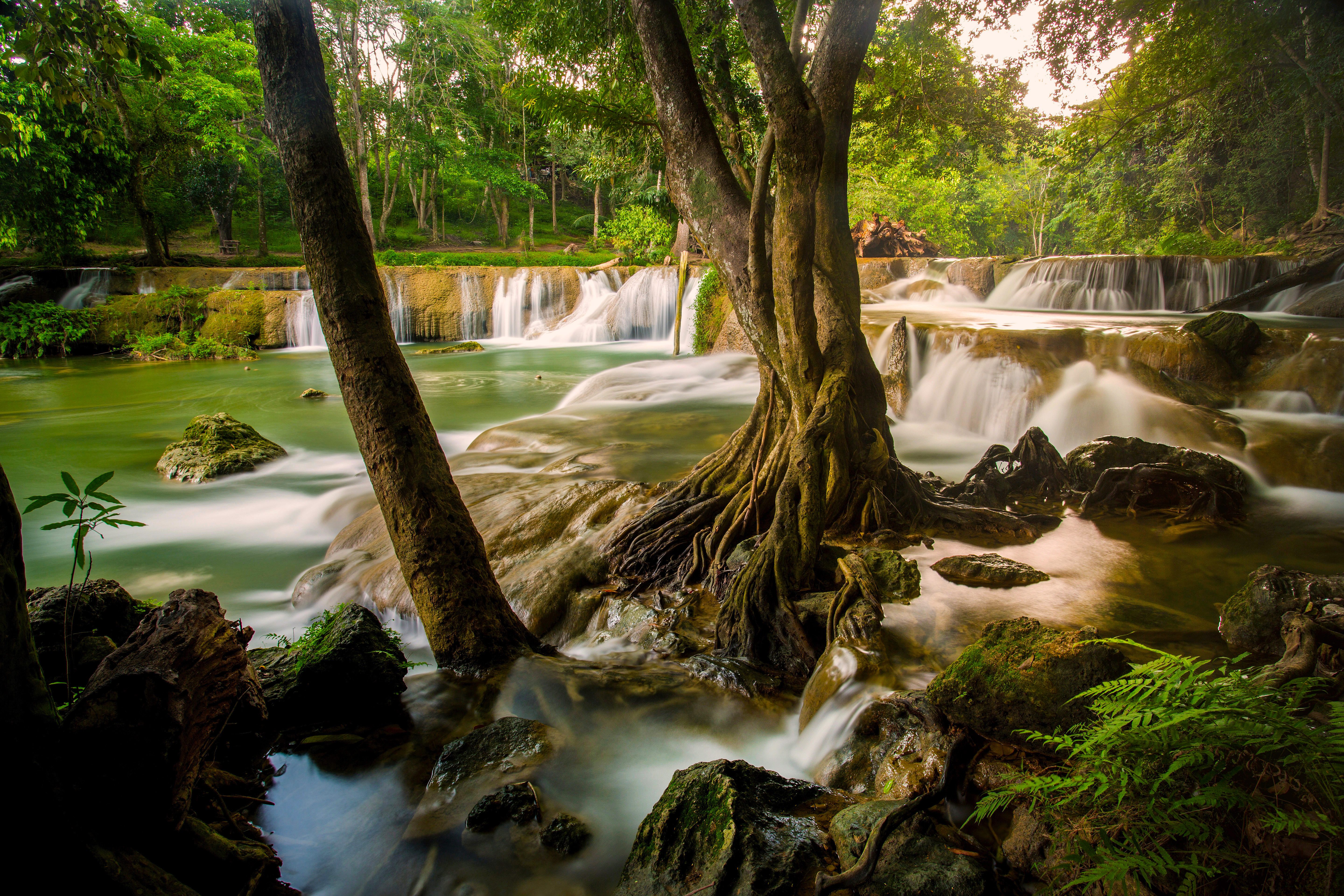 Chet Sao Noi National Park